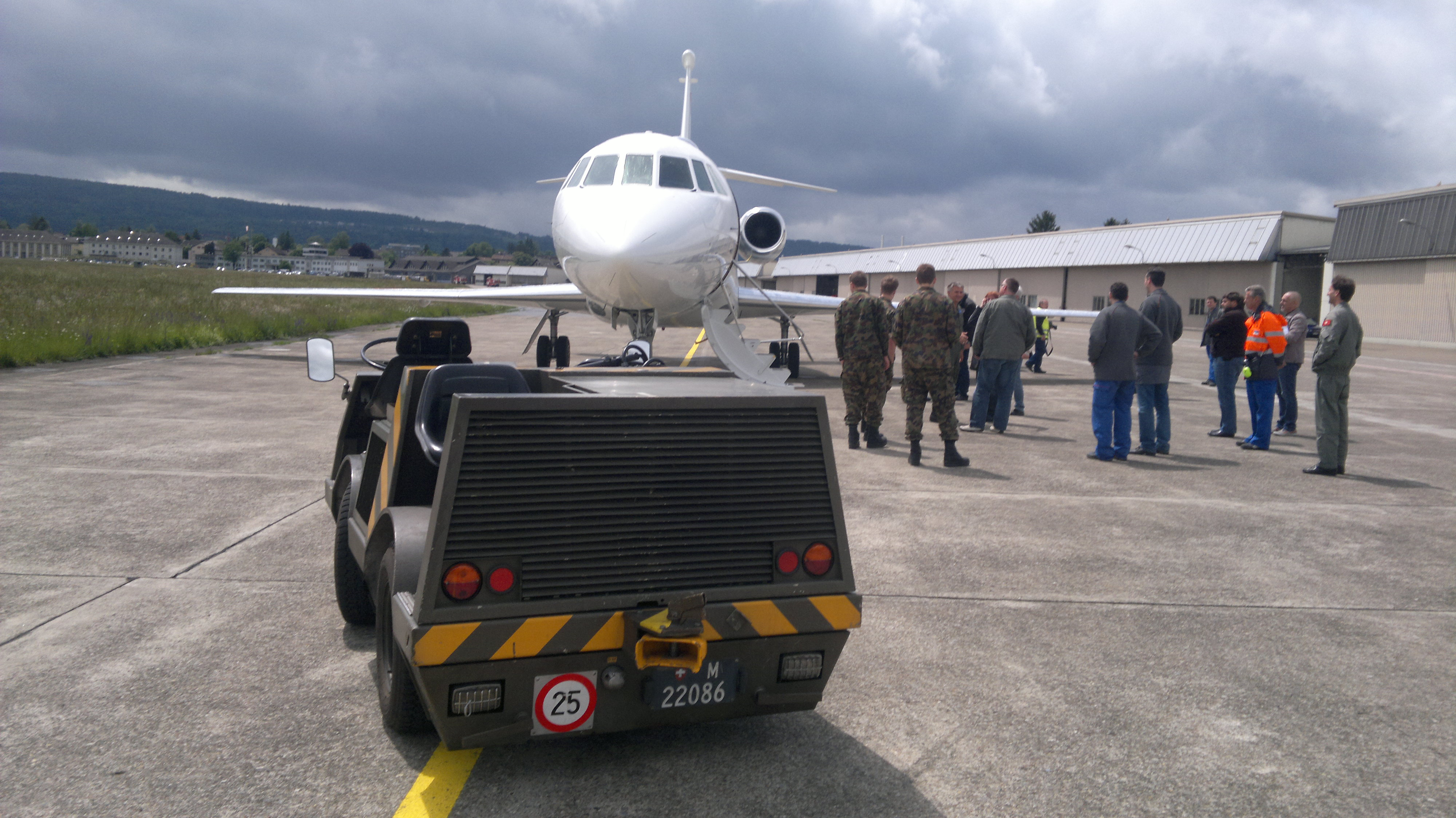 Swiss Air Force Falcon900 and Bucher FS 10 Flugzeugschlepper 78